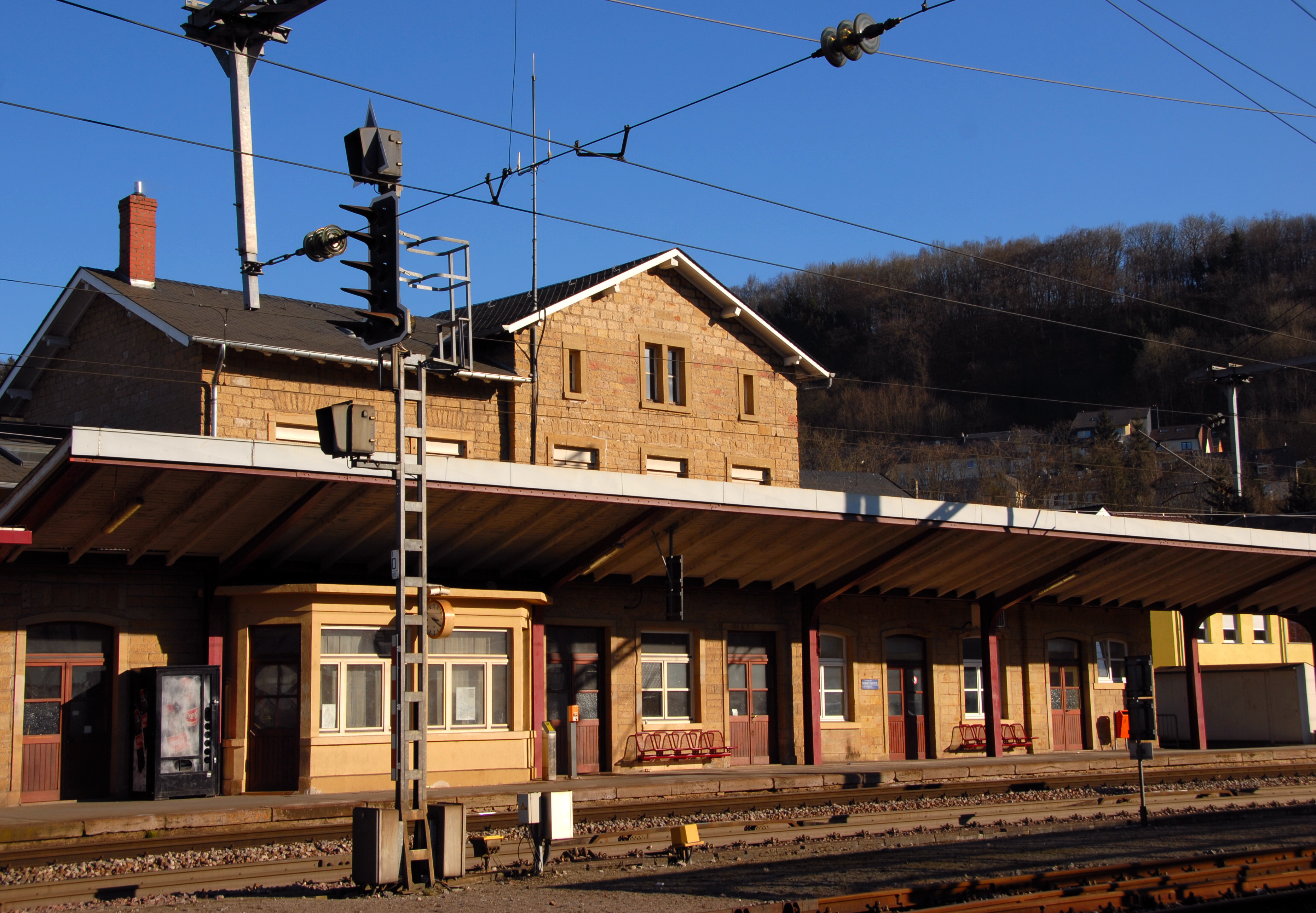 Sujet: D'Gare zu Dummeldeng Auteur: Fliedermaus Source: Eege Photo vum 16. Februar 2008 Lizenz: CC-by-sa/3.0/lu